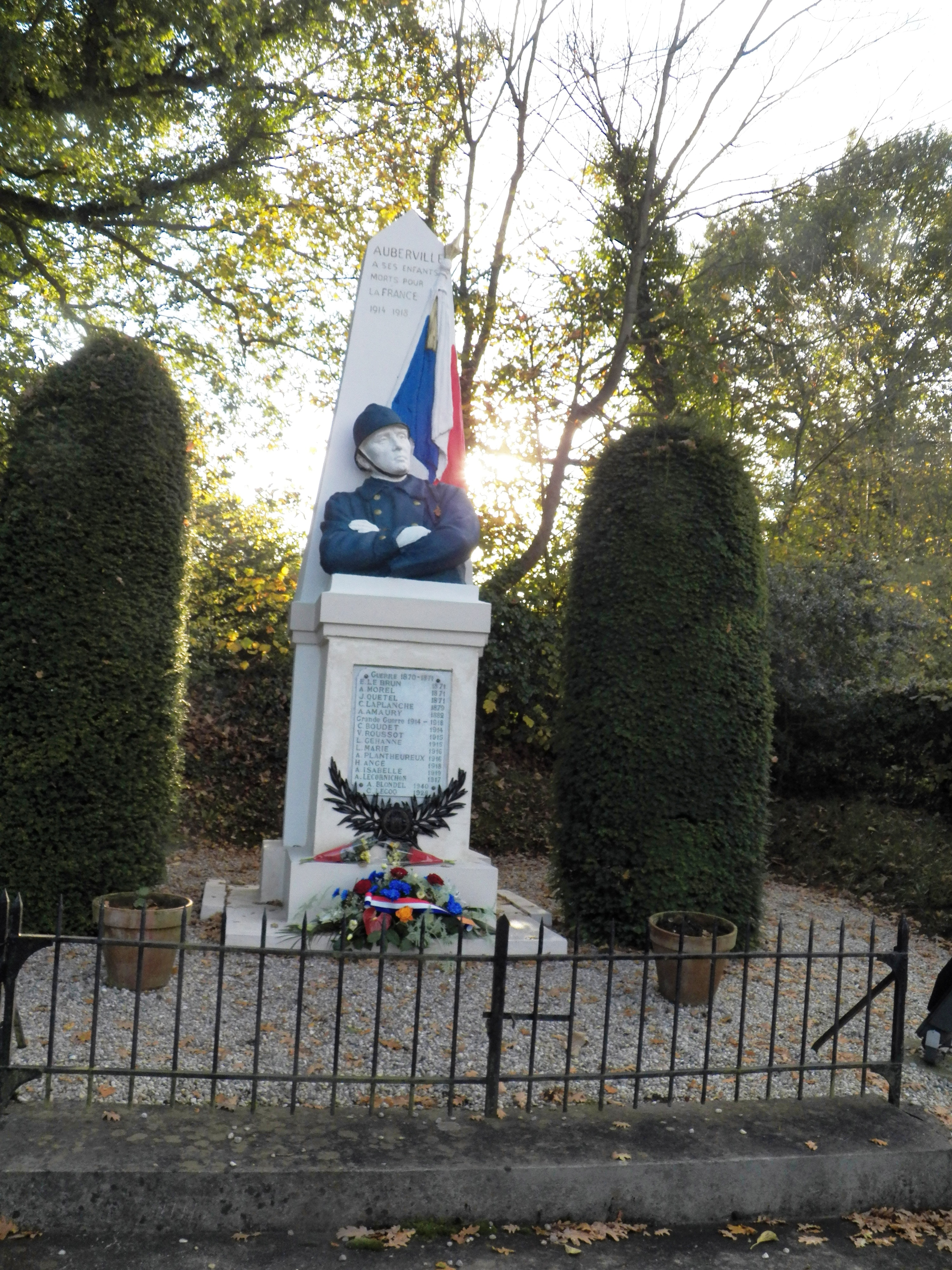 Monument aux morts des guerres de 1870, 1914-1918 et 1940 de la commune d'Auberville (Calvados).